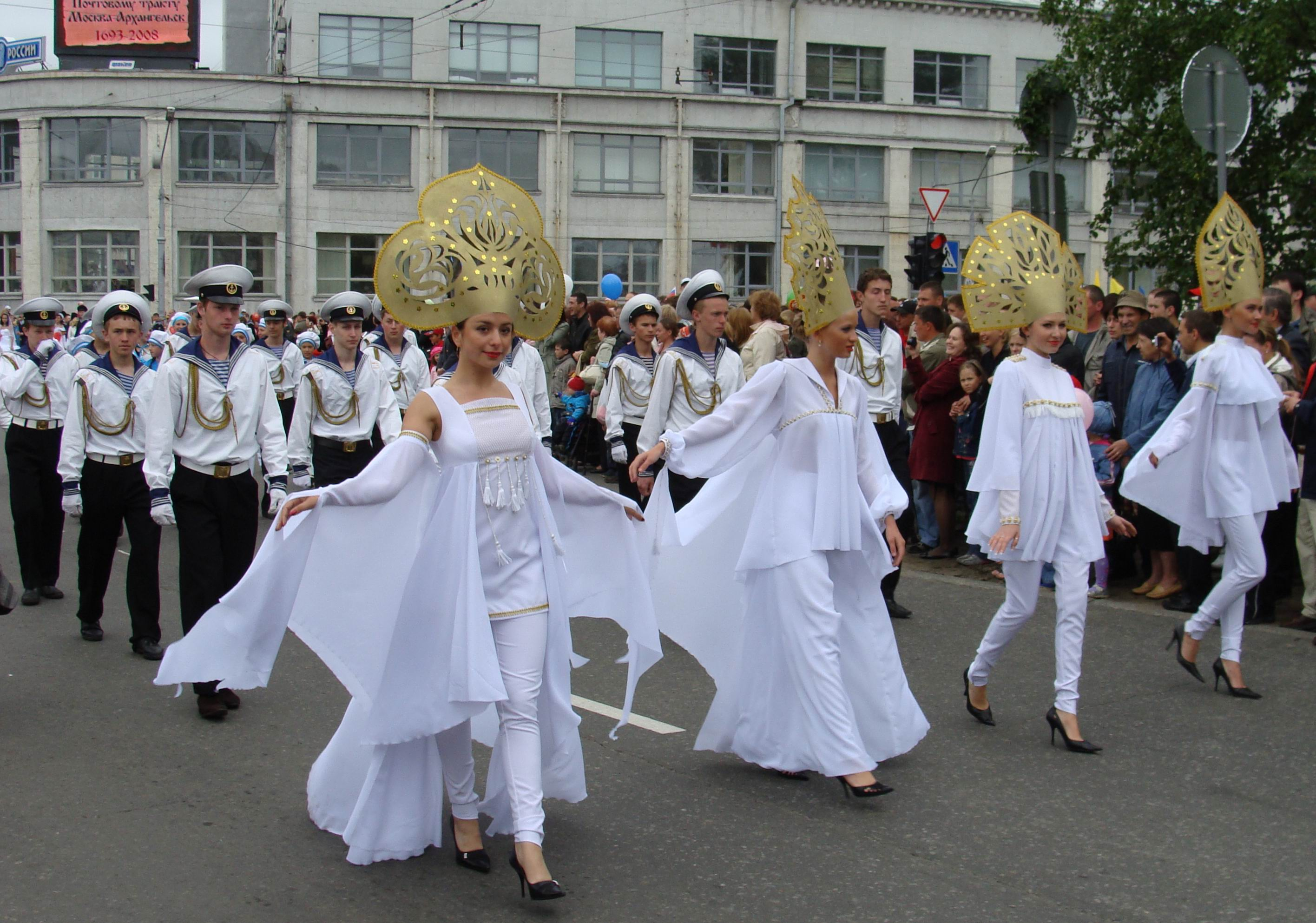 Парад посвященный юбилею города Архангельска. тысячи архангелогородцев собрались на площади Ленина перед зданием телецентра, чтобы посмотреть праздничное шествие.